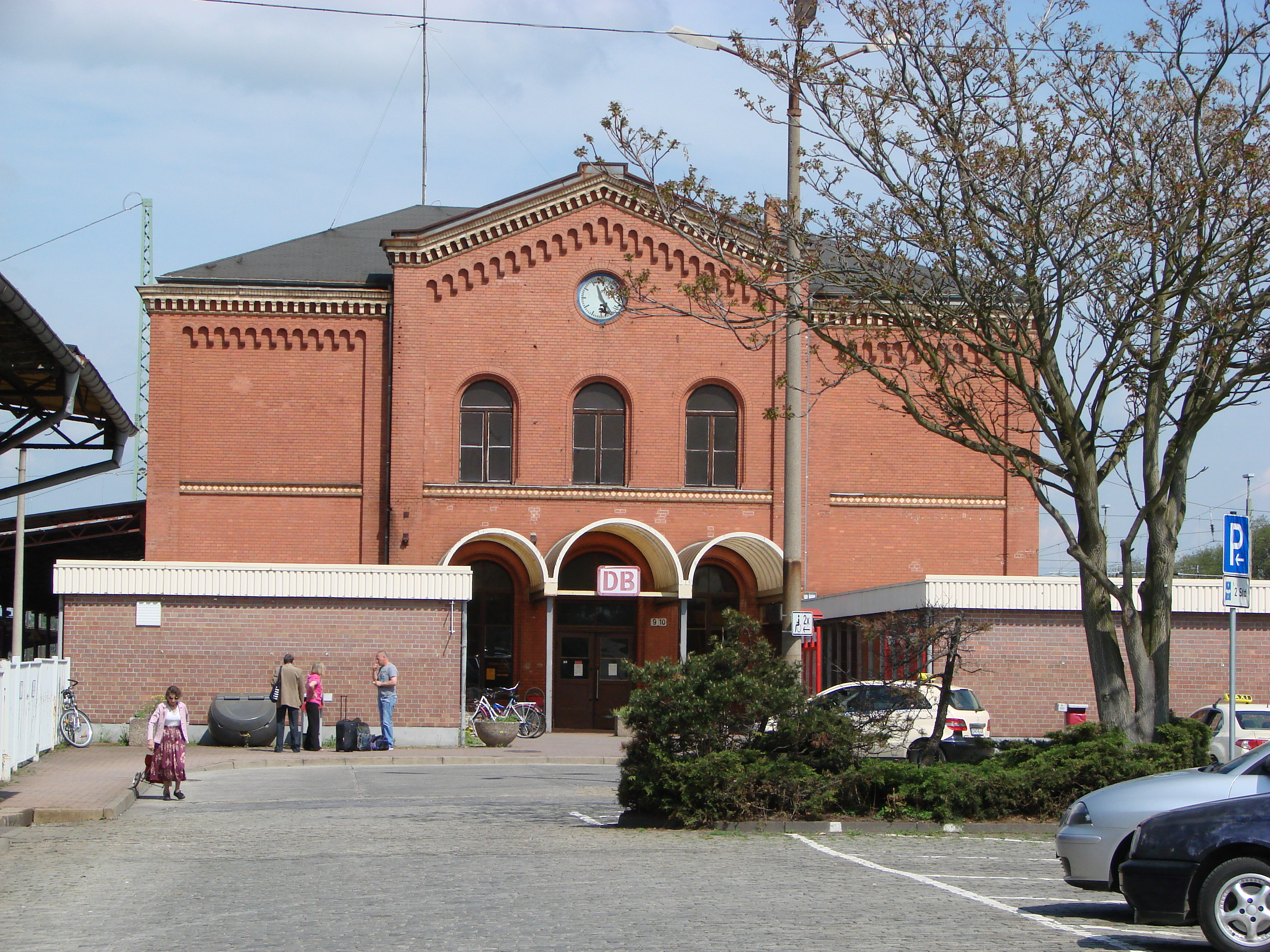 Baudenkmal, Bahnhofempfangsgebäude